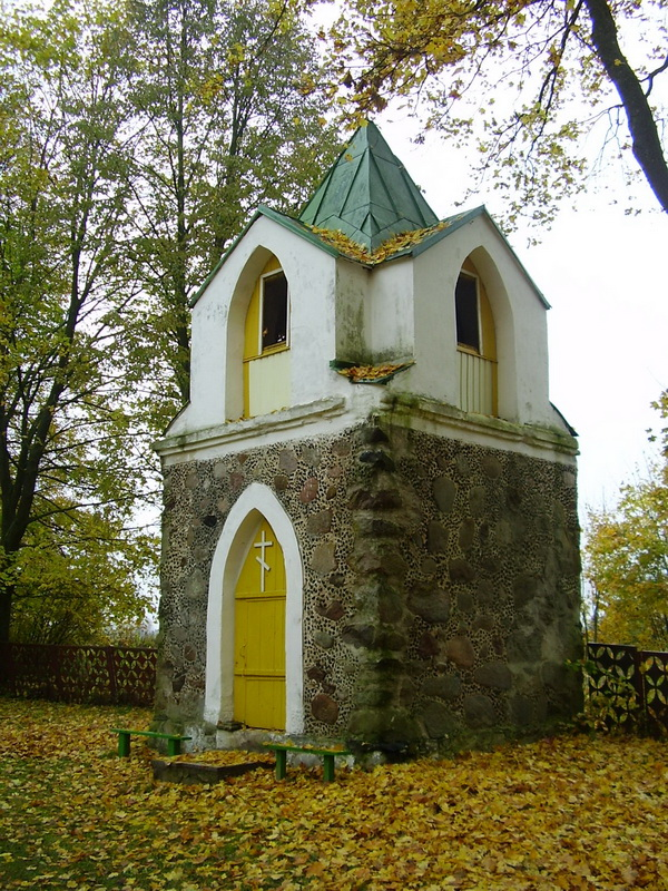 Дзяляцічы. Краявіды